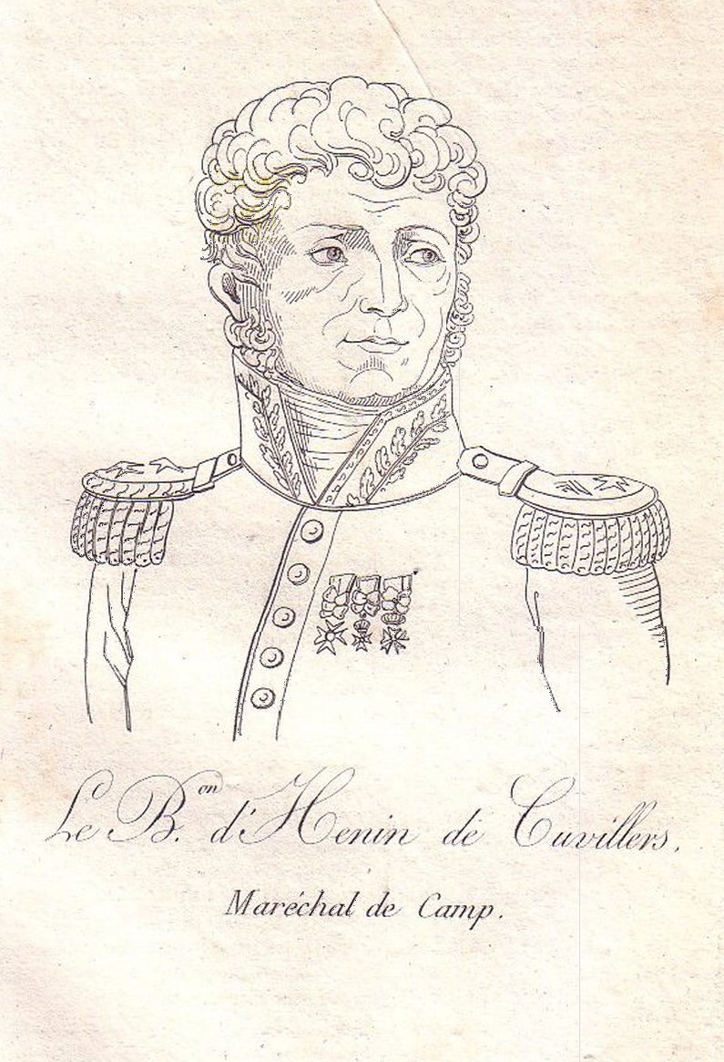 Étienne Félix d'Henin de Cuvillers